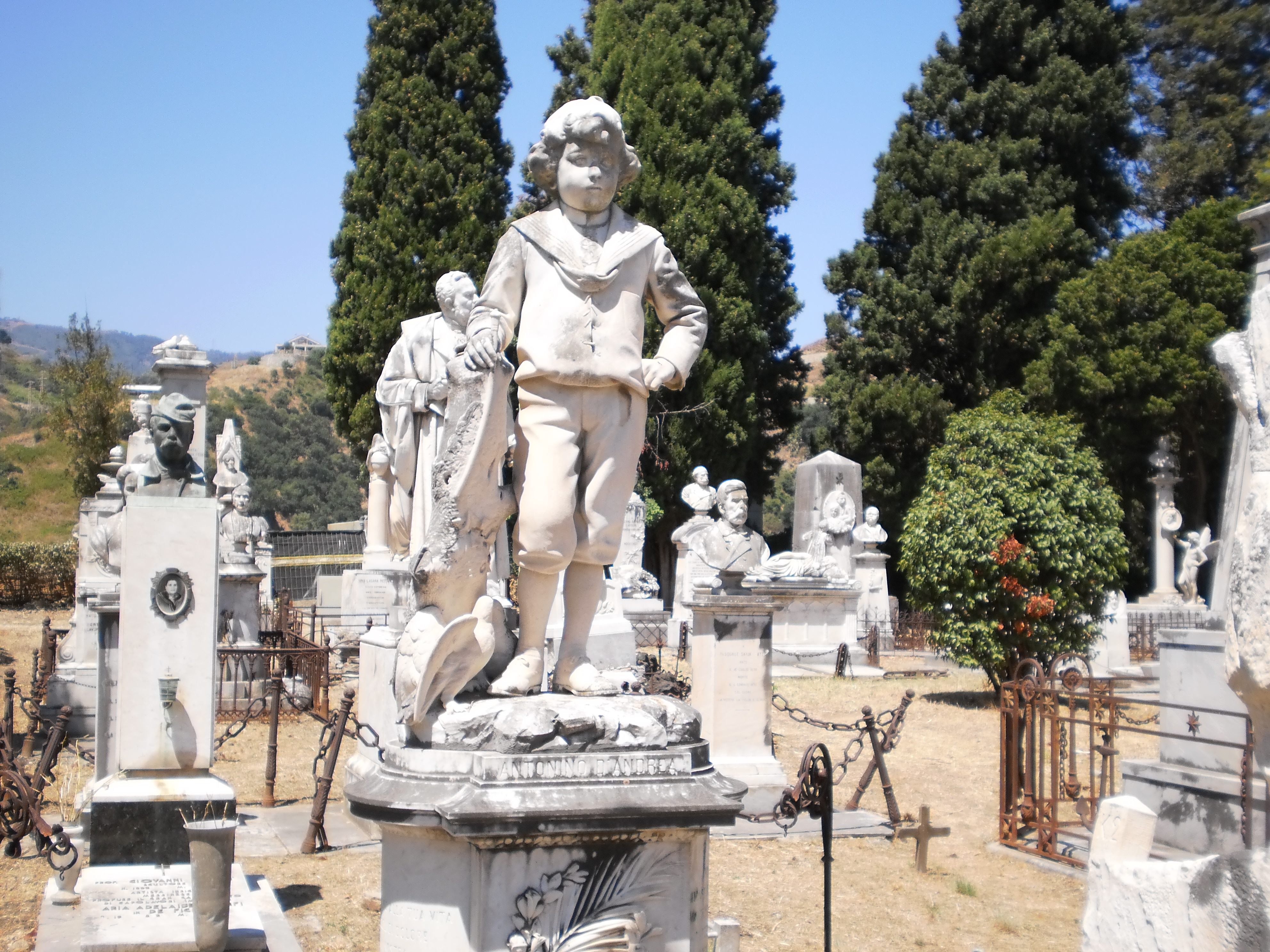 Monumento funerario a Messina